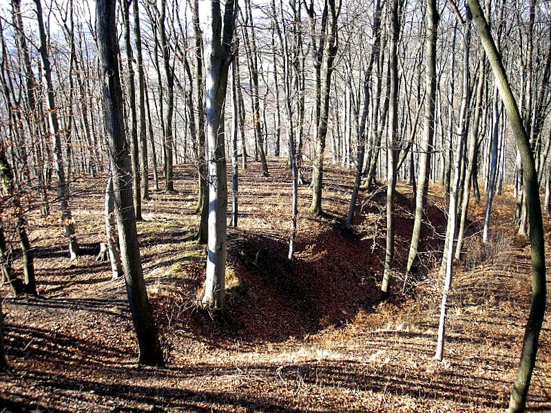 Hochmittelalterlicher Burgstall Mühlhausen (Gemeinde Affing, Landkreis Aichach-Friedberg, Bayerisch-Schwaben). Das nordwestliche Vorwerk. Eigene Aufnahme, Feb. 2008 / High Middle Ages Muehlhausen castle near Affing (Landkreis Aichach-Friedberg, Bavaria, Germany). The north western bailey. Own photo, Feb. 2008